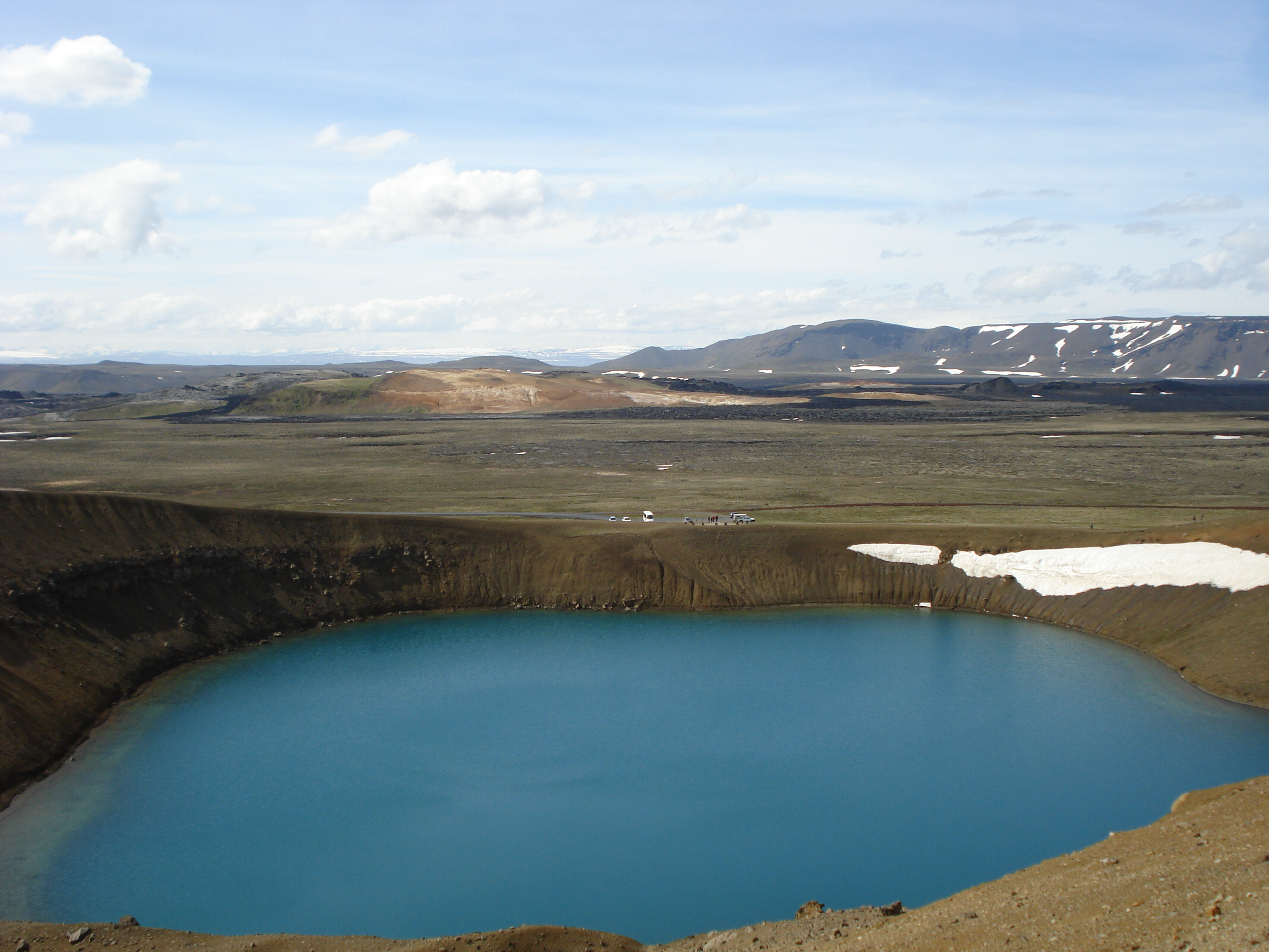 crater Víti at Krafla